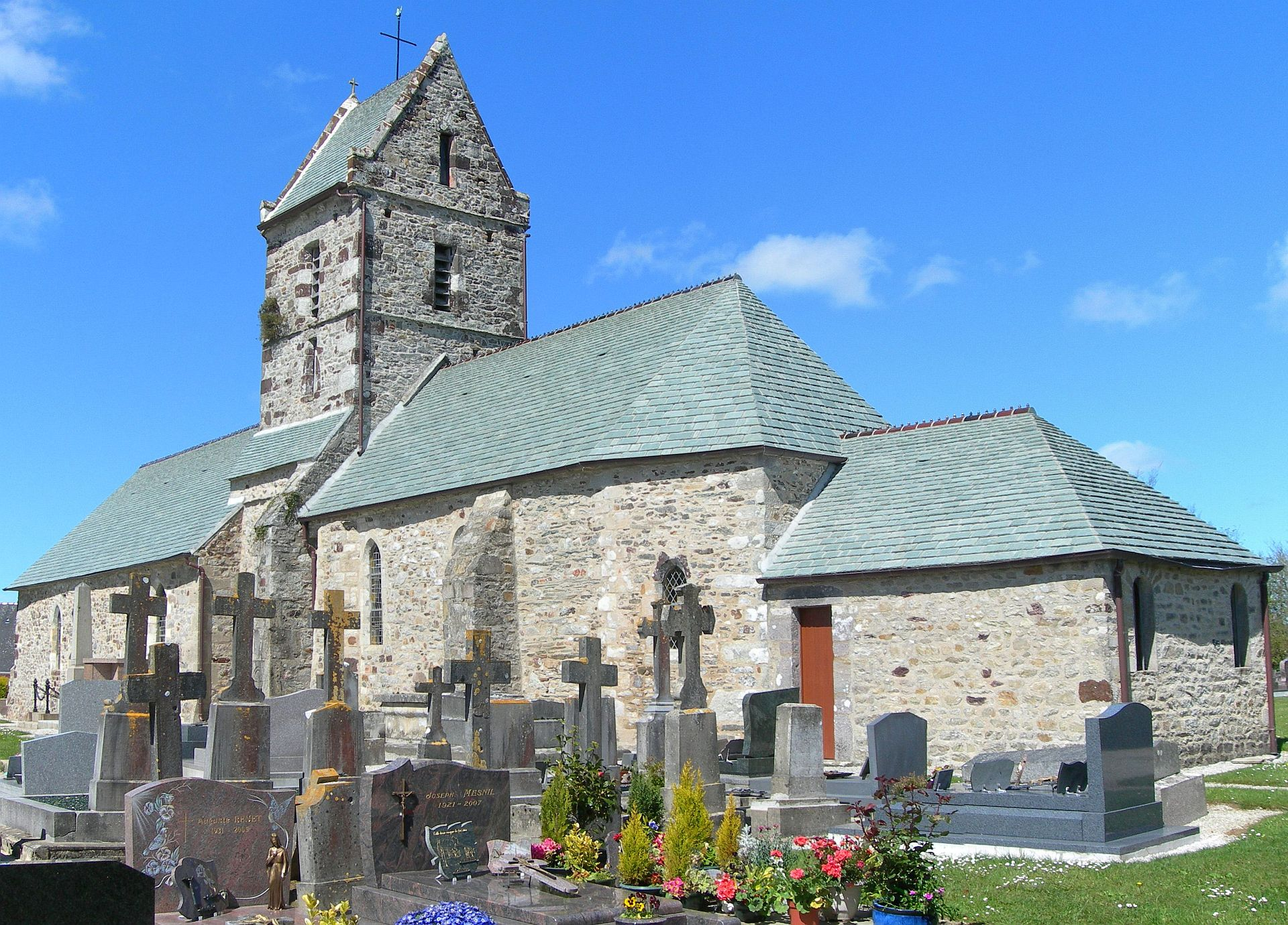 Eglise Notre-Dame d'Acqueville